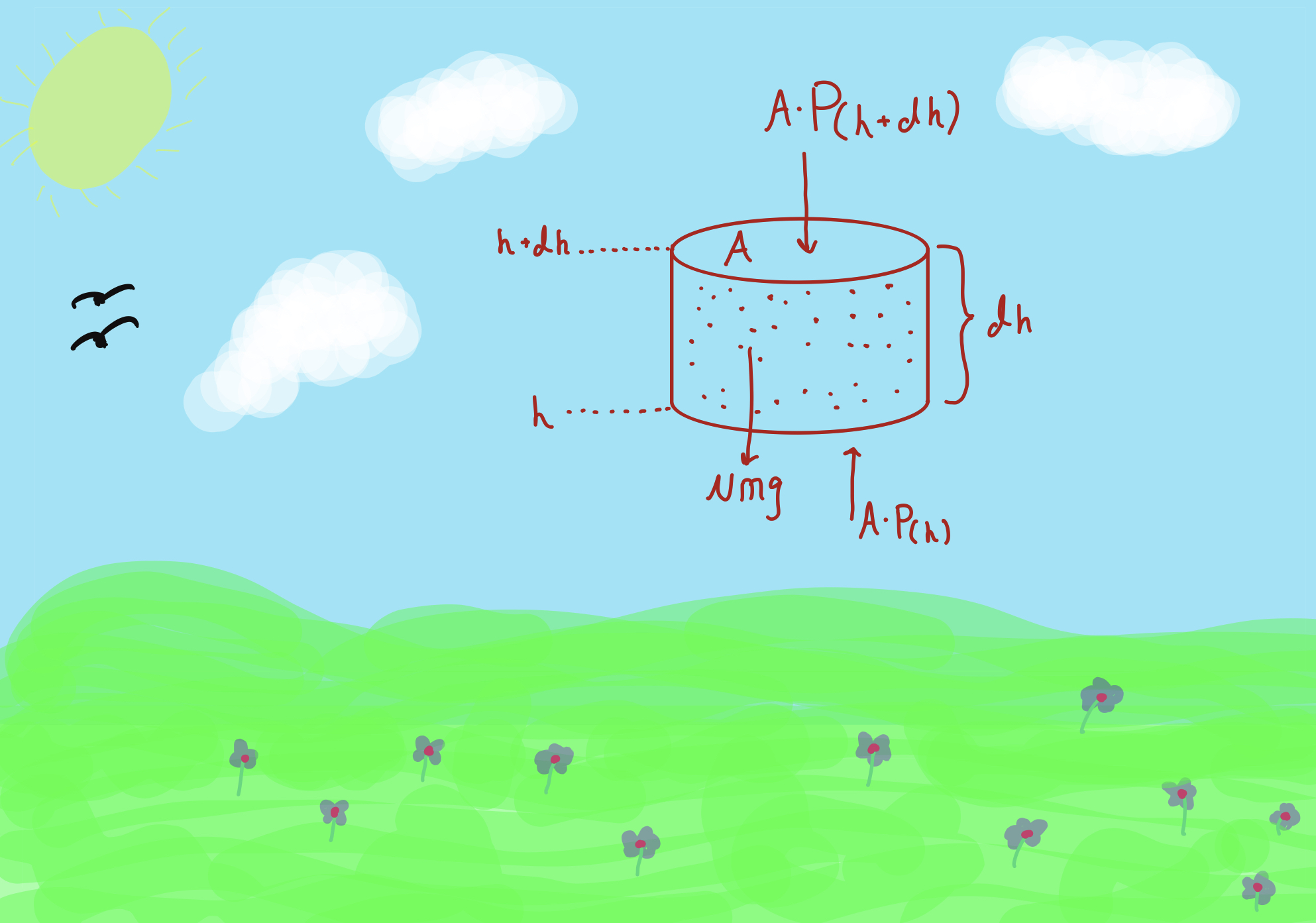 איור עזר לפיתוח הנוסחה הברומטרית